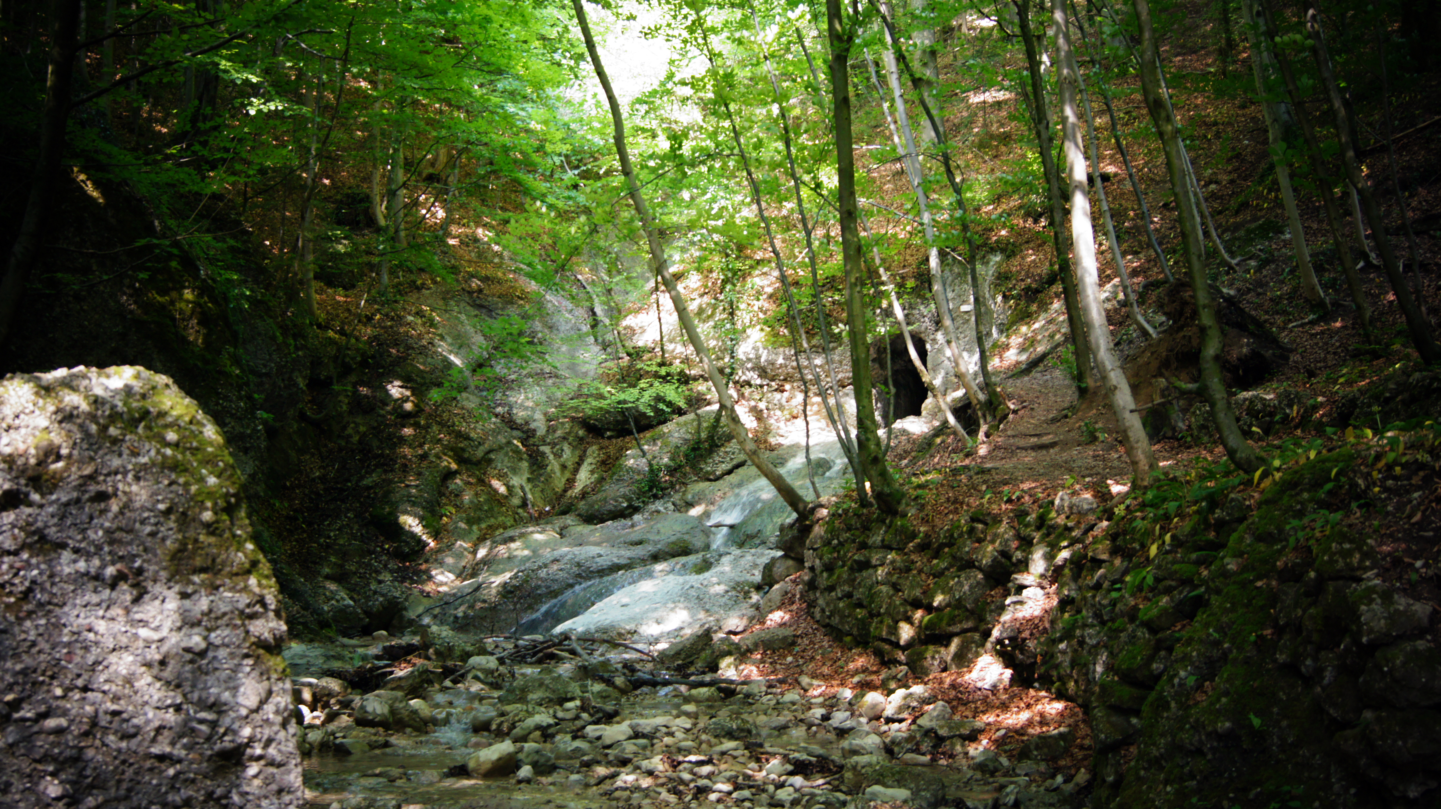 Aigner Park mit Felberbach This media shows the Geschützter Landschaftsteil in Salzburg with the ID GLT00008. This media shows the Geschützter Landschaftsteil in Salzburg with the ID GLT00111.